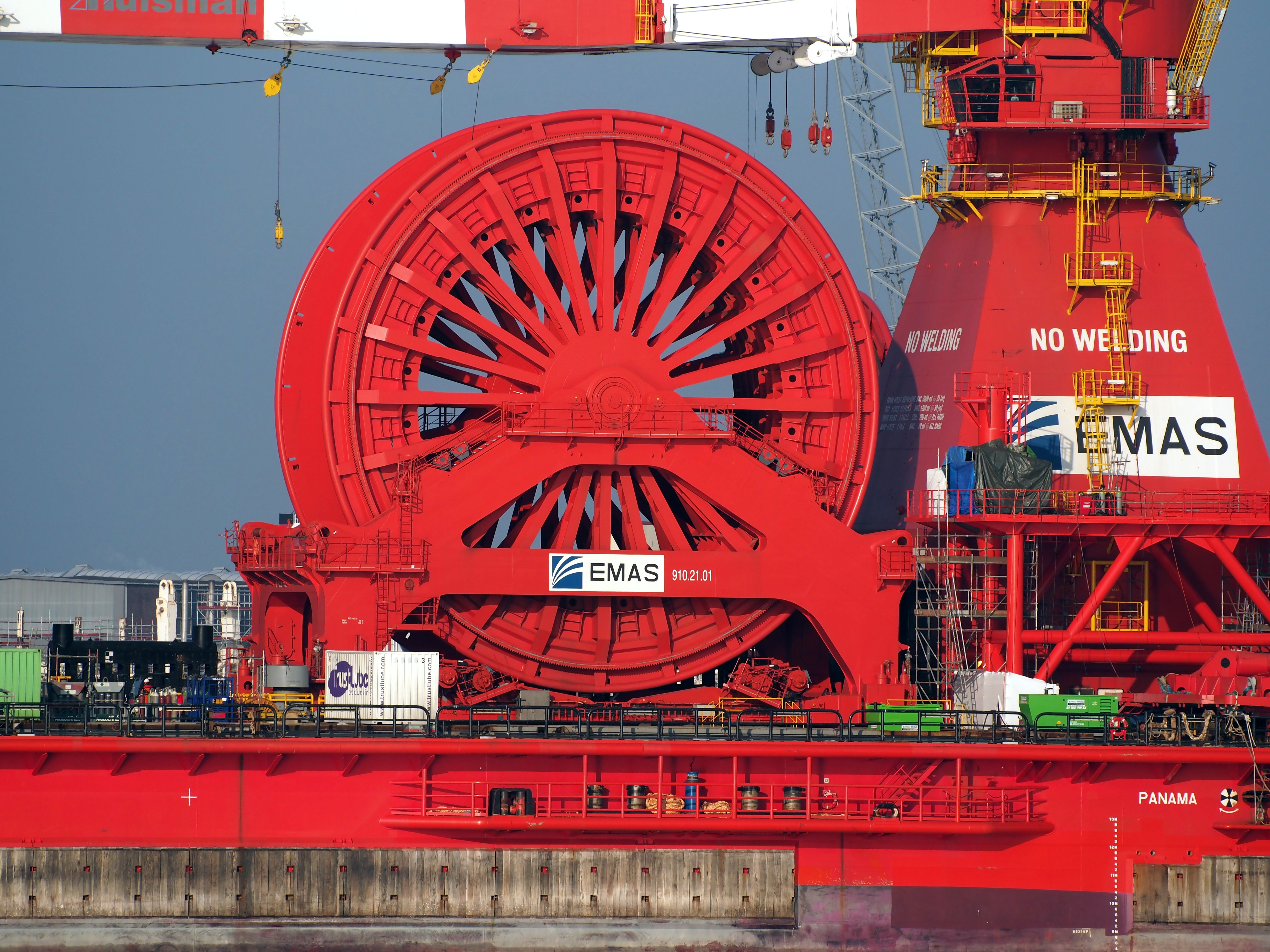 LEWEK CONSTELLATION IMO 9629756, Nieuwe Maas, Port of Rotterdam.